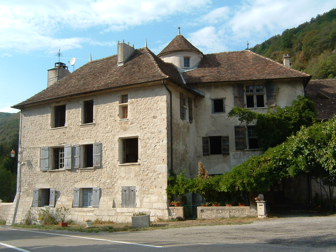 Château de Rossillon (Rossillon, Ain, France)